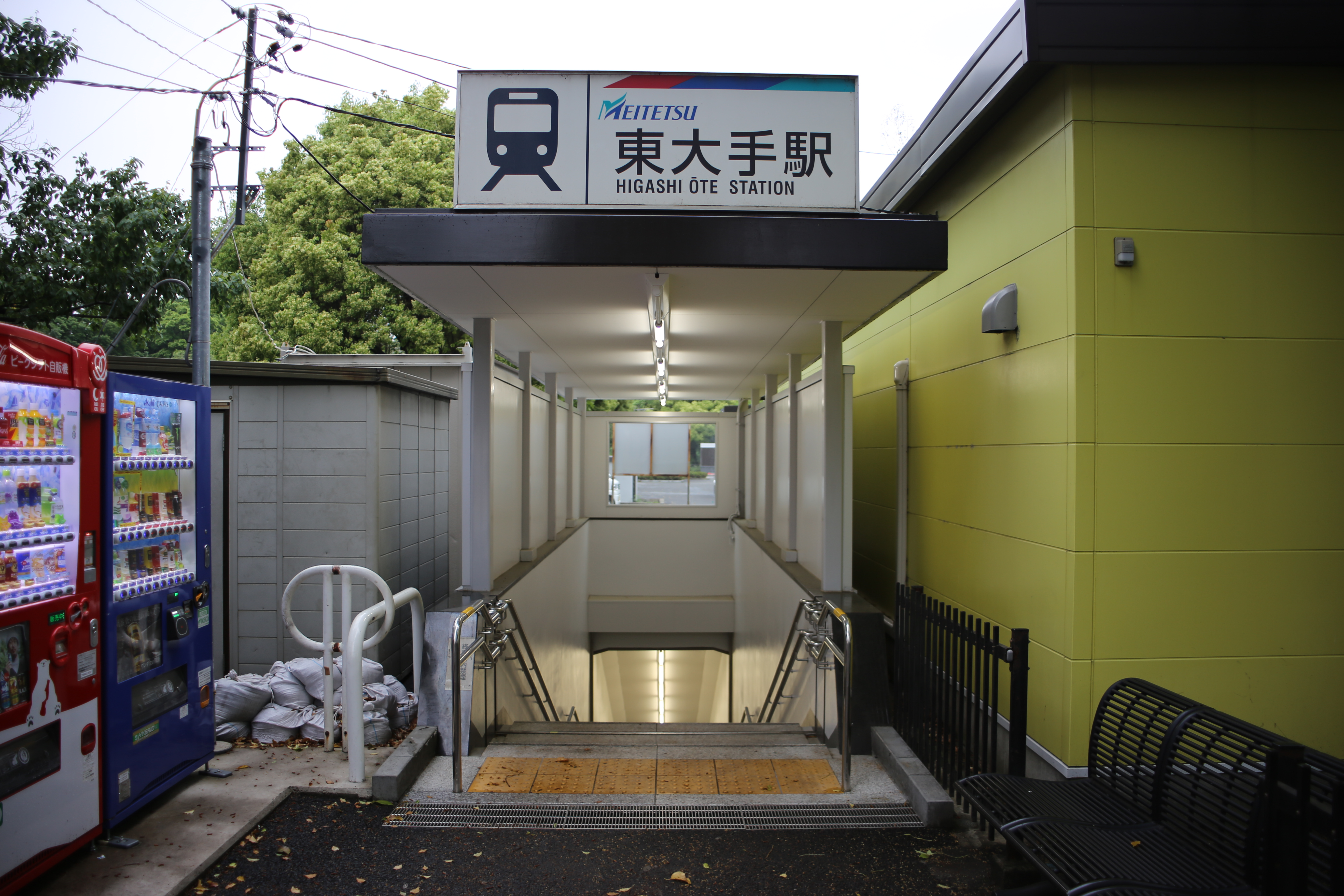 名鉄瀬戸線東大手駅